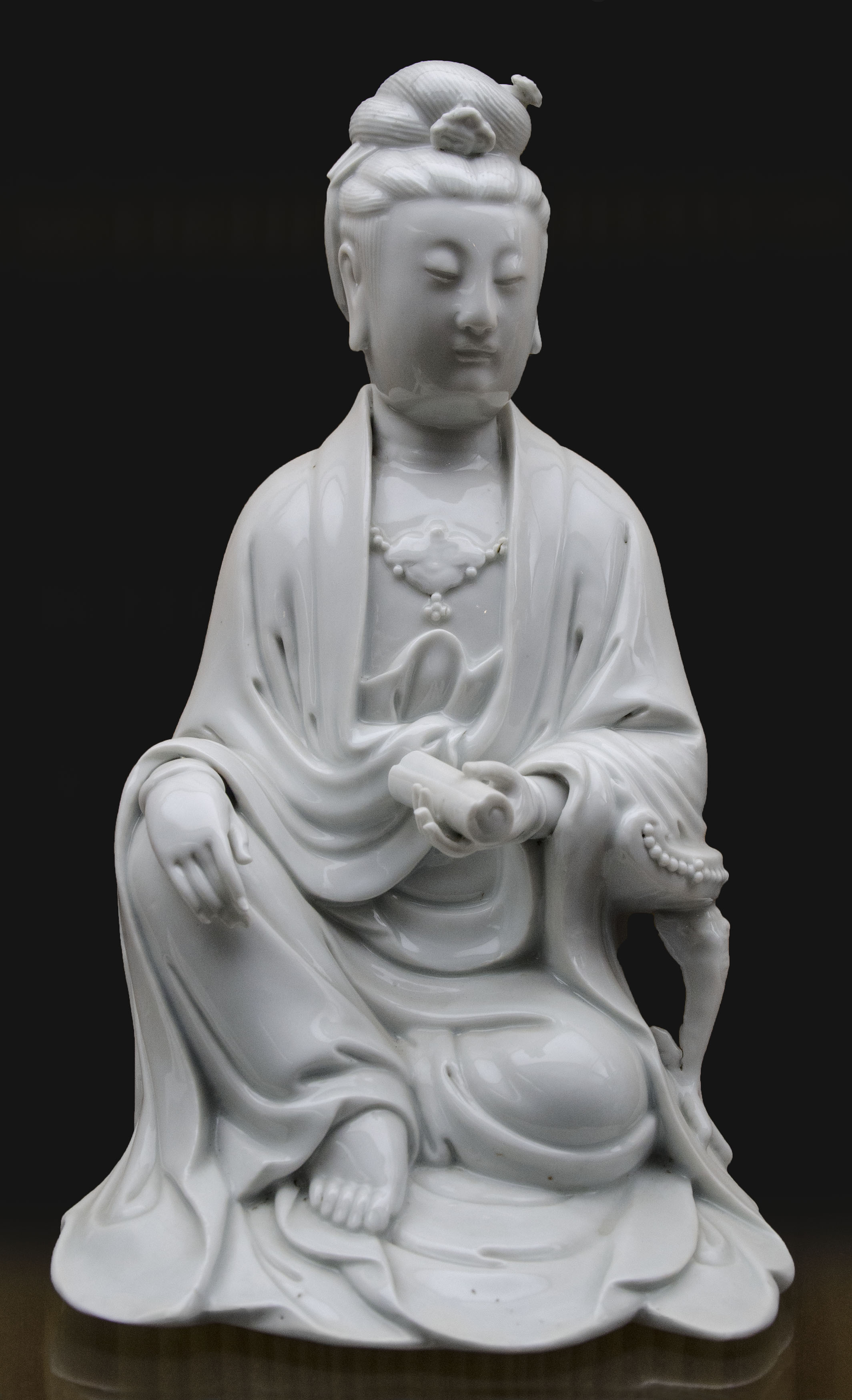 El Monasterio de Santo Tomás en Ávila tiene varias salas que forman el Museo de Arte Oriental. Este museo incluye piezas procedentes de las misiones de los dominicos en China, Japón, Vietnam y Filipinas. La pequeña figura de porcelana representa a Guan Yin, un bodhisattva de la mitología budista. Está datada entre los siglos XVII y XVIII y procede de China.